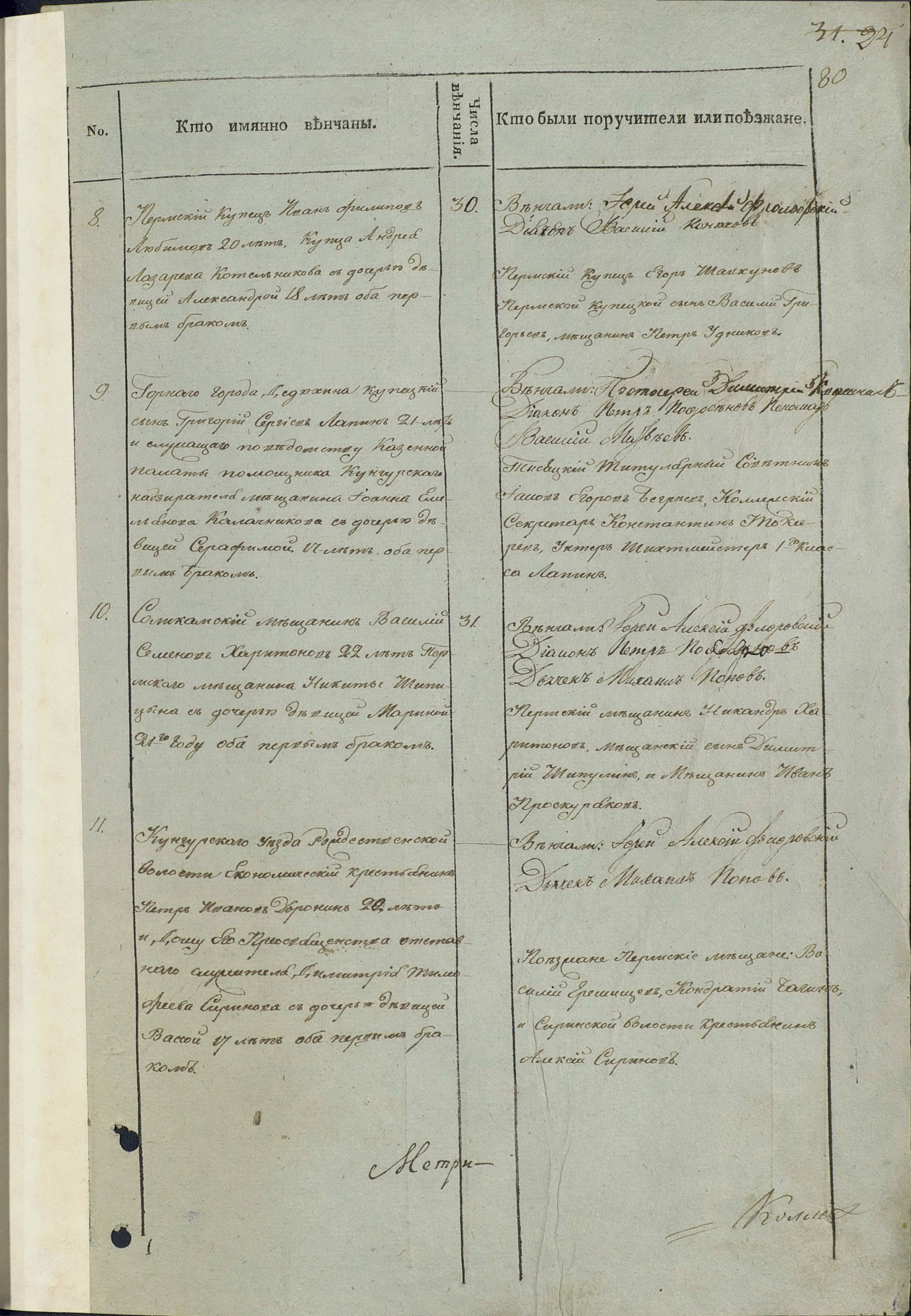 ГАПК Ф.37.Оп.1.Д.55 — Метрическая книга Рождество-Богородицкая церковь, г.Пермь за 1827 год Иван Филиппович Любимов запись о браке 1827-01-30 "Пермский купец Иван Филиппов Любимов, 20 лет. Купца Андрея Лазарева Котельникова с дочерью девицей Александрой, 18 лет, оба первым браком"